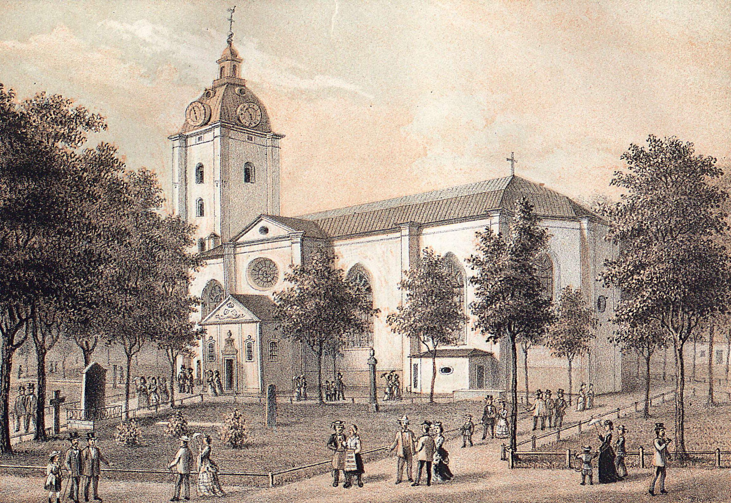 Klara kyrka, Stockholm 1874